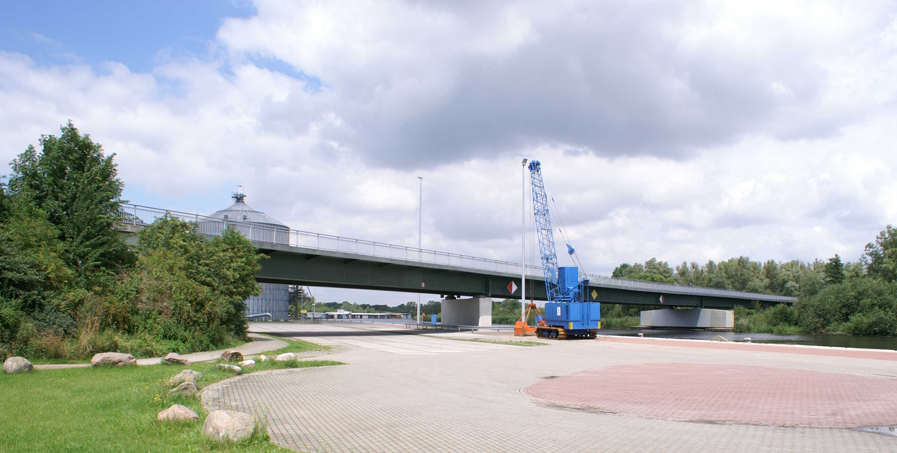 Die Peenebrücke der L 35 (frühere B 96) in Jarmen, Landkreis Demmin, Vorpommern.